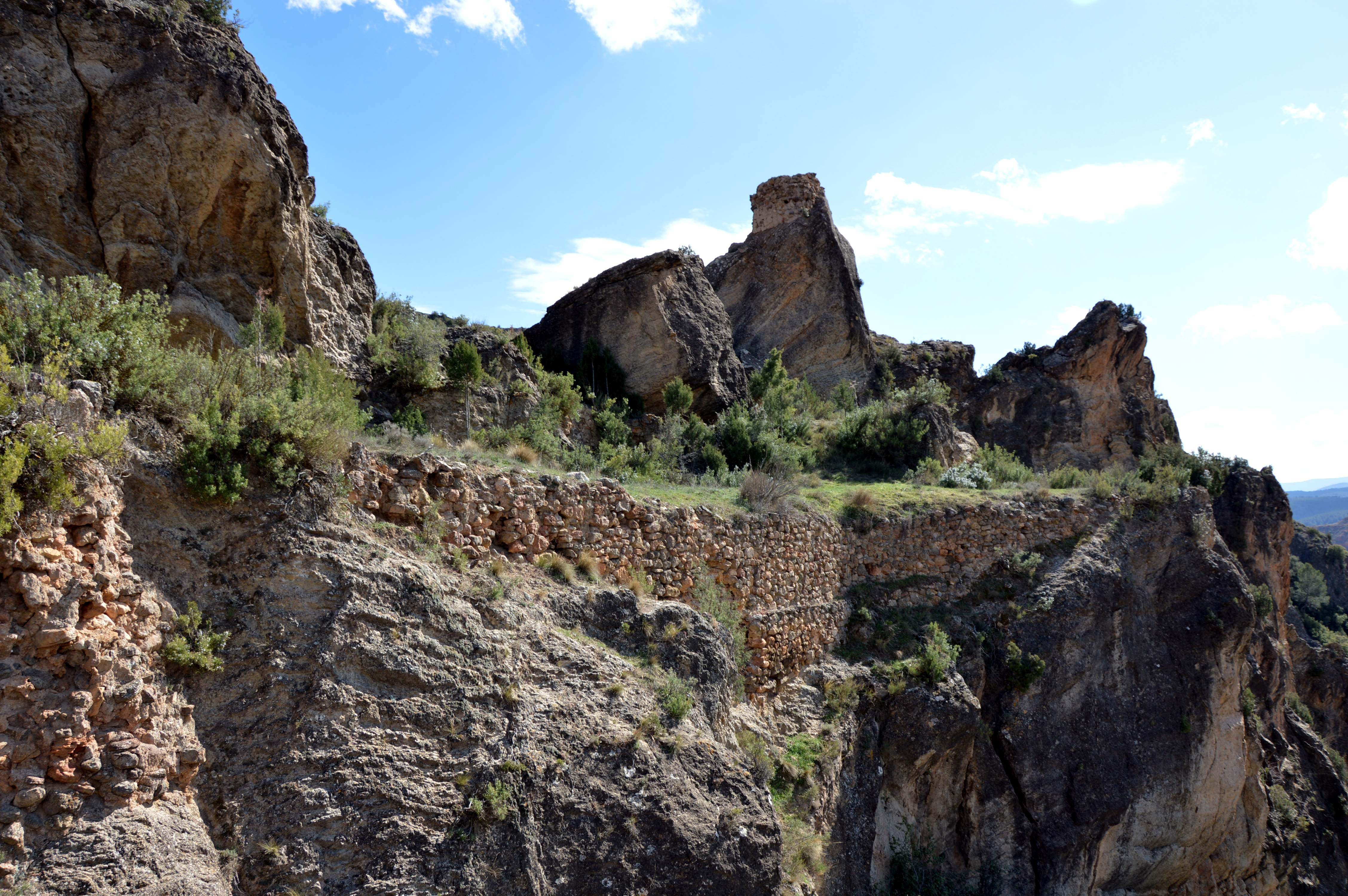 Detalle de muros desmochados en el Castillo de Tramacastiel